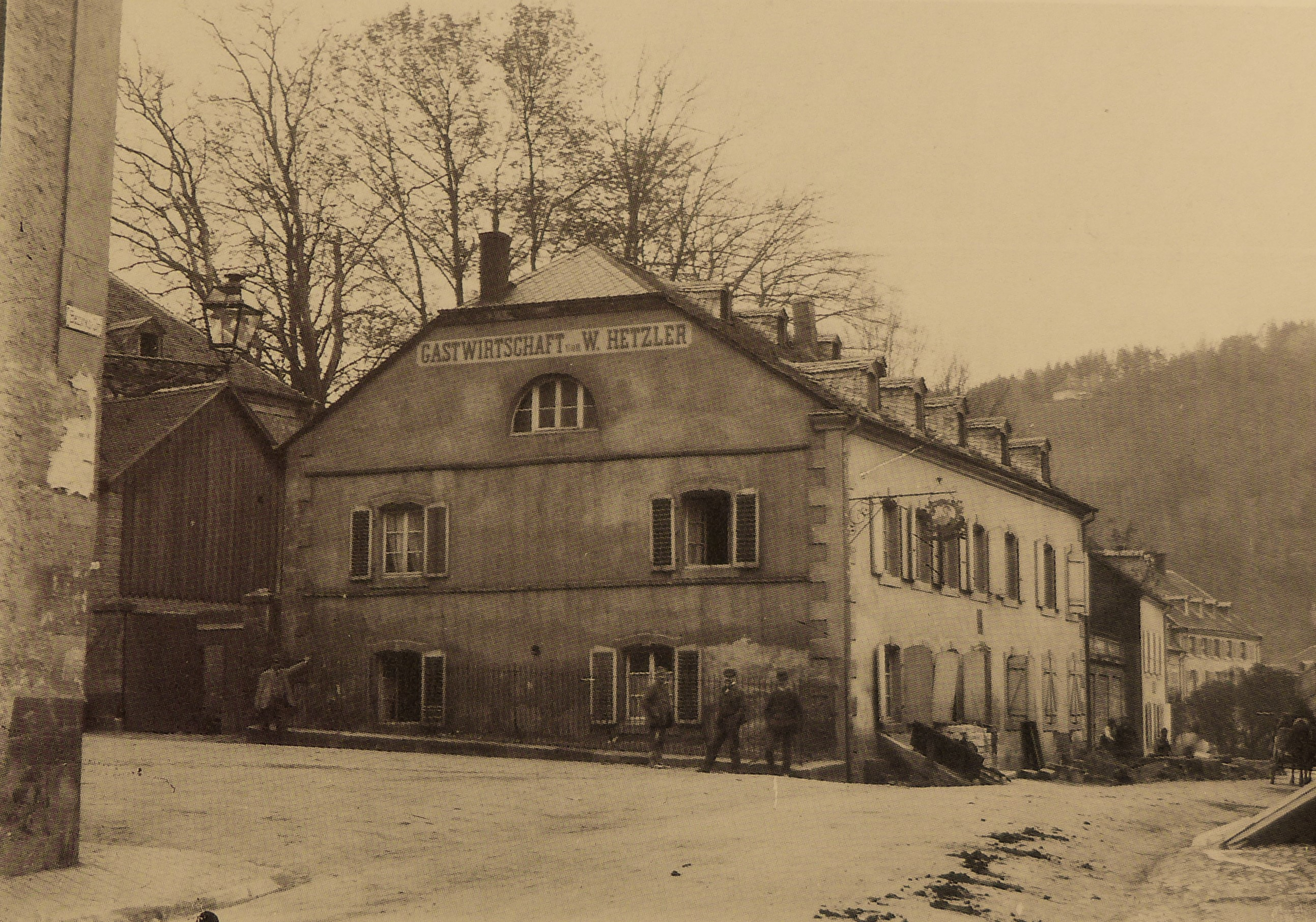 Wallerfangen, Gasthof zum goldenen Schwan um 1890 vor dem Neubau des Jahres 1897 am Ort des alten Wallerfanger Kirchhofes (Archiv des Vereins für Heimatforschung Wallerfangen e. V.)